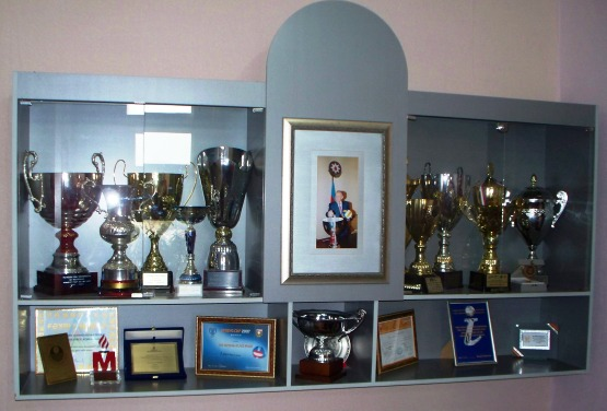 уголок славы азербайджанского волейбола